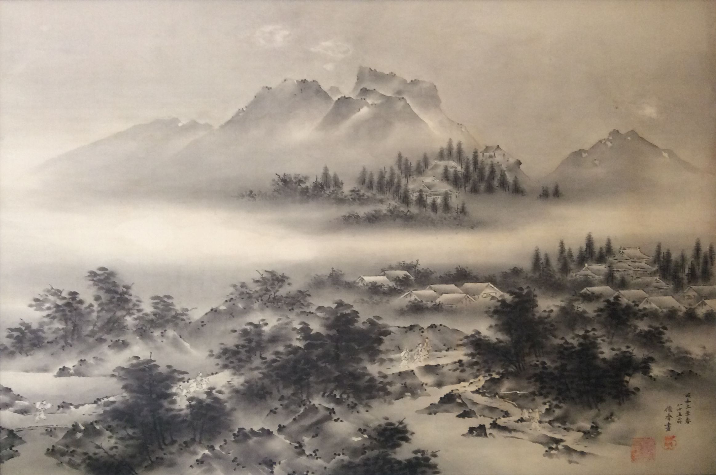 溌墨山水図 杉浦家蔵（2015年3月撮影）